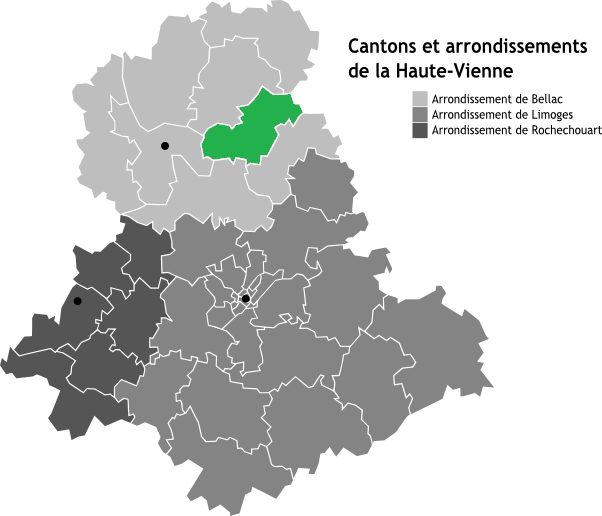 Canton de Châteauponsac, Limousin, France en Carte des arrondissements de la Haute-Vienne